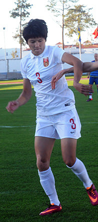 a_41_6702